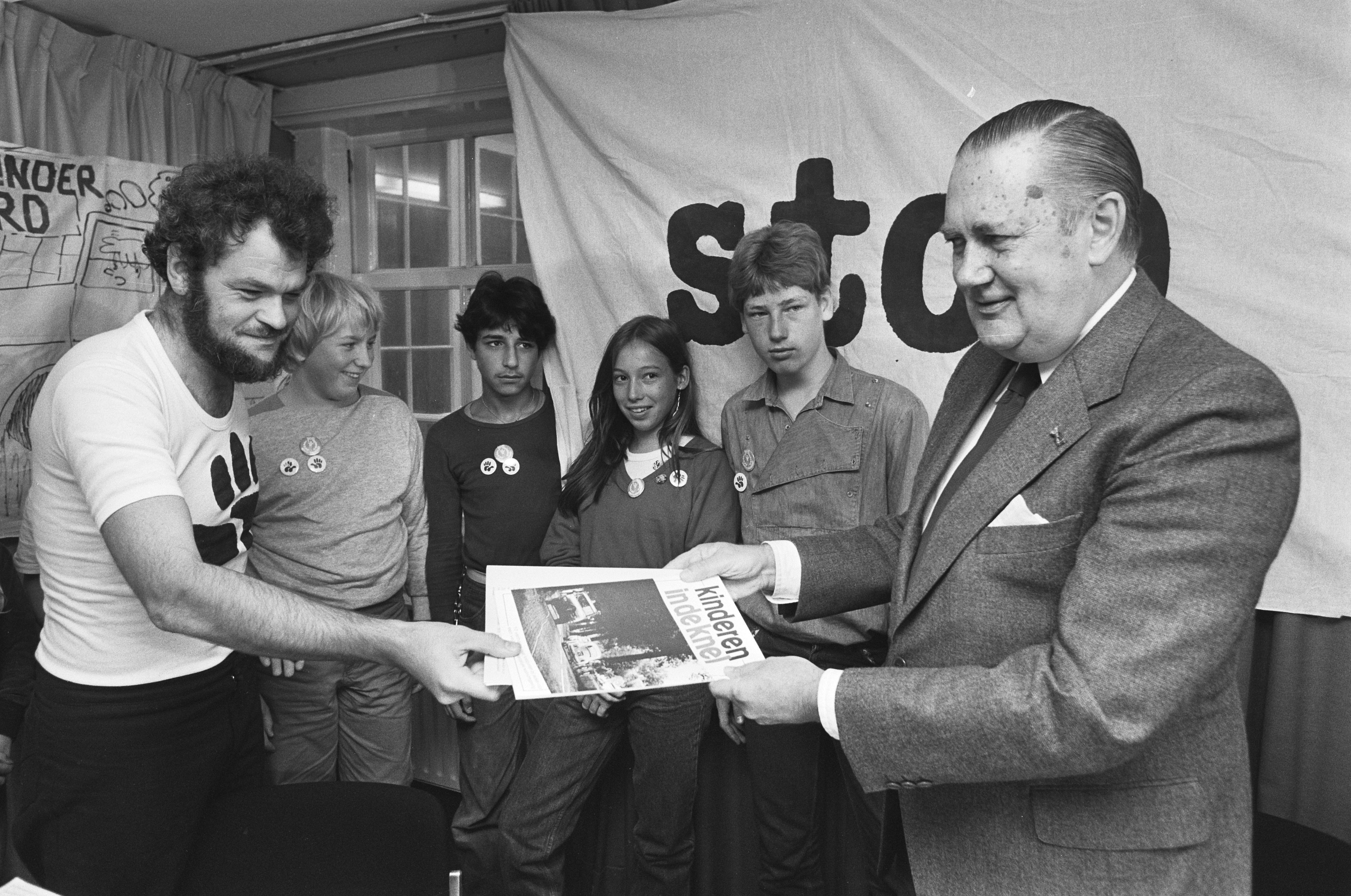 Collectie / Archief : Fotocollectie Anefo Reportage / Serie : [ onbekend ] Beschrijving : Minister Zeevalking neemt eisenpakket van de actiegroep "Stop de kindermoord" in ontvangst Datum : 28 september 1982 Trefwoorden : acties, ministers, politiek Persoonsnaam : Zeevalking, H.J. Fotograaf : Croes, Rob C. / Anefo Auteursrechthebbende : Nationaal Archief Materiaalsoort : Negatief (zwart/wit) Nummer archiefinventaris : bekijk toegang 2.24.01.05 Bestanddeelnummer : 932-3449